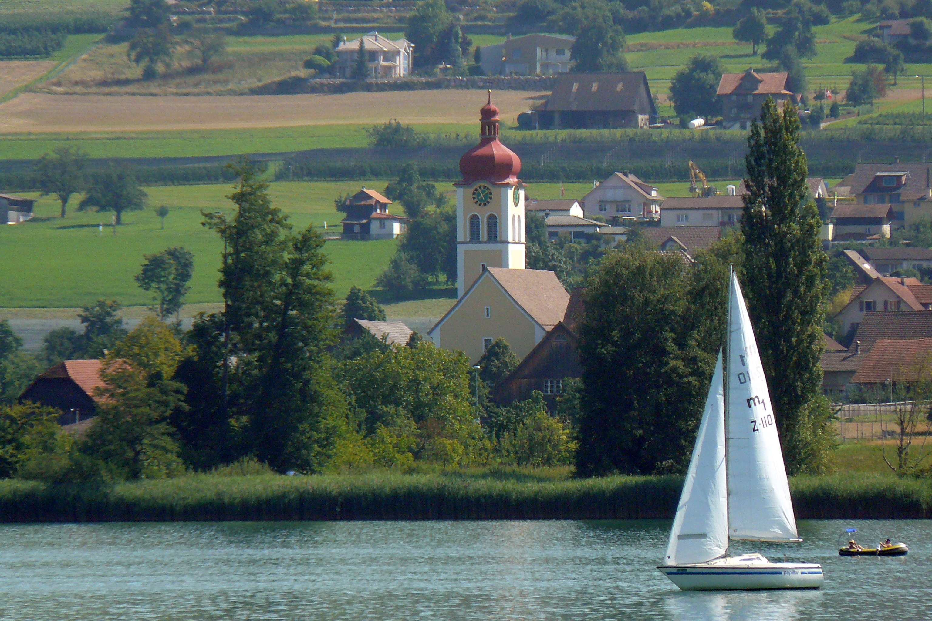 Aesch (canton de Lucerne, Suisse) : le Hallwilersee et l'église St.Luzia